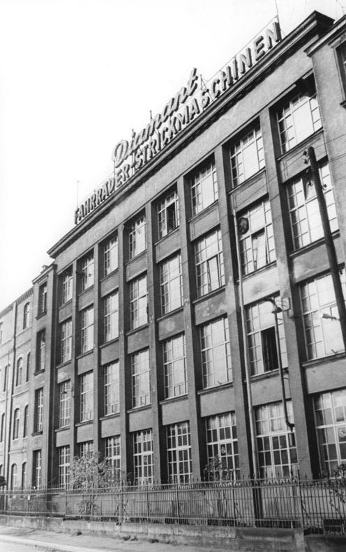 Chemnitz, VEB Elite Diamant Zentralbild Schlegel 8.10.1958 Zur Vorbereitung der Wahl: VEB Elite Diamant und westdeutscher Großbetrieb wollen Vergleiche anstellen Entsprechend dem erneuten Vorschlag des FOGB-Bundesvorstandes an den DGB-Vorsitzenden Willi Richter, Vergleiche zwischen der Lebenslage der Arbeiter in beiden deutschen Staaten anzustellen, hat das volkseigene Fahrradwerk Elite Diamant in Karl-Marx-Stadt Kontakte zu einem Großbetrieb in Nordrhein-Westfalen aufgenommen. Als erster Schritt wurde beschlossen, in beiden Betrieben eine Befragung der Belegschaften gegen die Atomrüstung der Bonner Nato-Armee und für eine atomwaffenfreie Zone in Mitteleuropa zu organisieren. (Näheres siehe ADN-Meldung Nr.218 vom 26.9.58) UBz: Aussenansicht des Werkes.